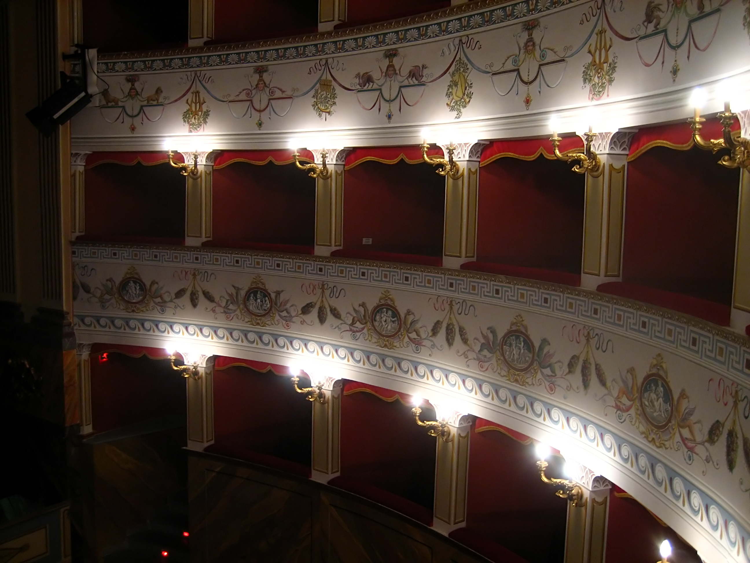 Città della Pieve, Umbria, Italiacurve